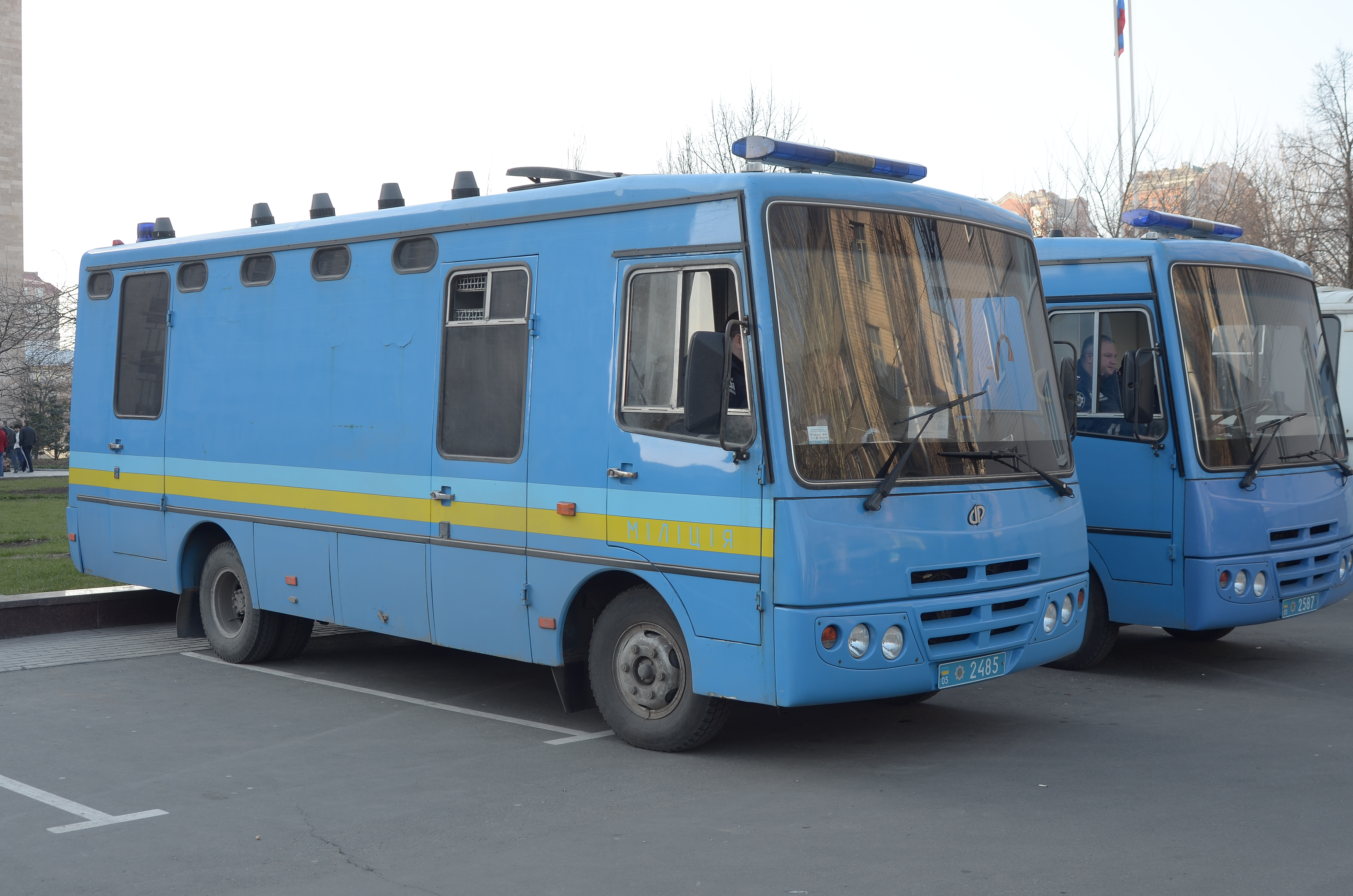 Протесты в Донецке